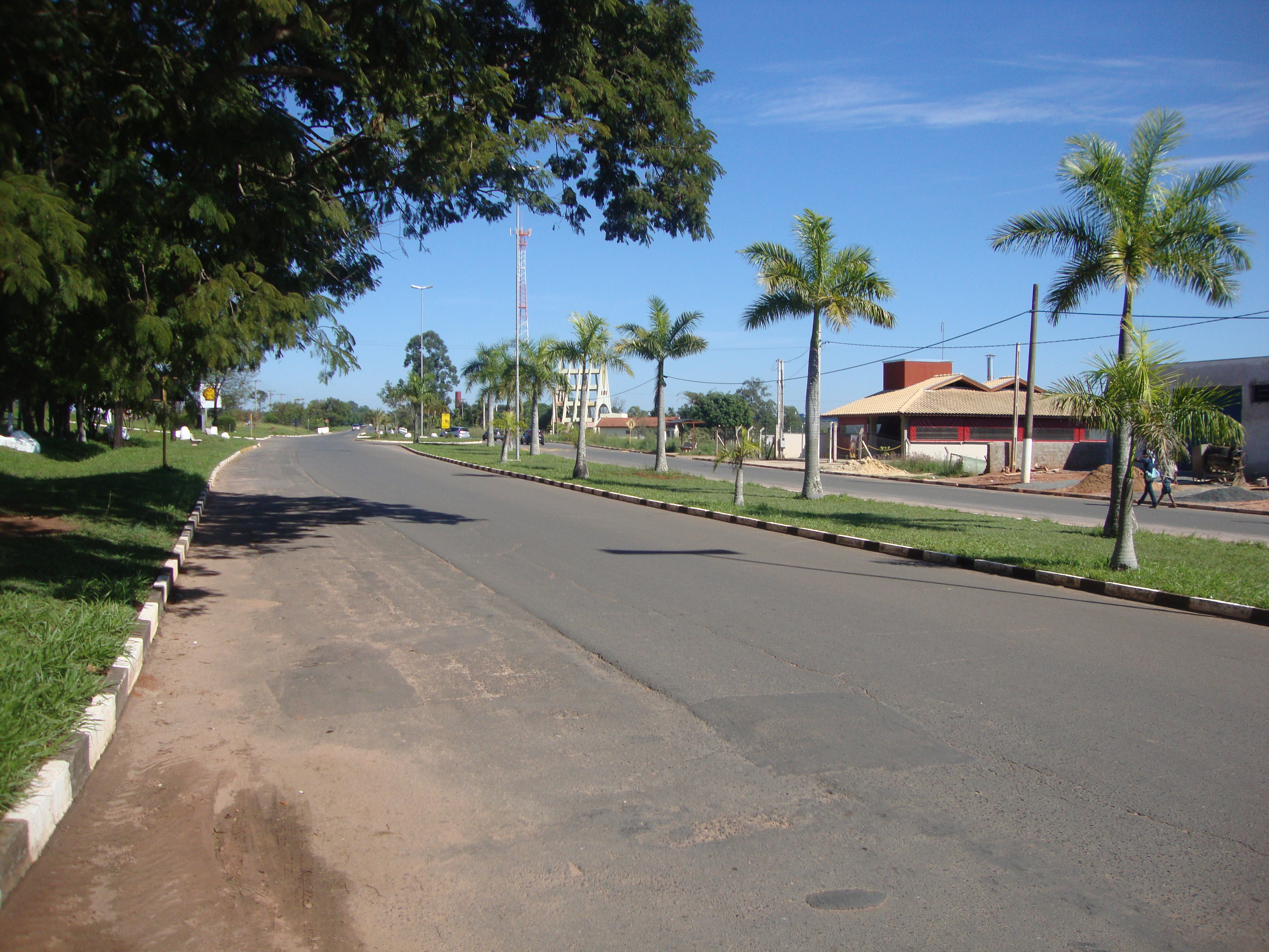 Entrada principal da cidade de Estiva Gerbi SP Brasil